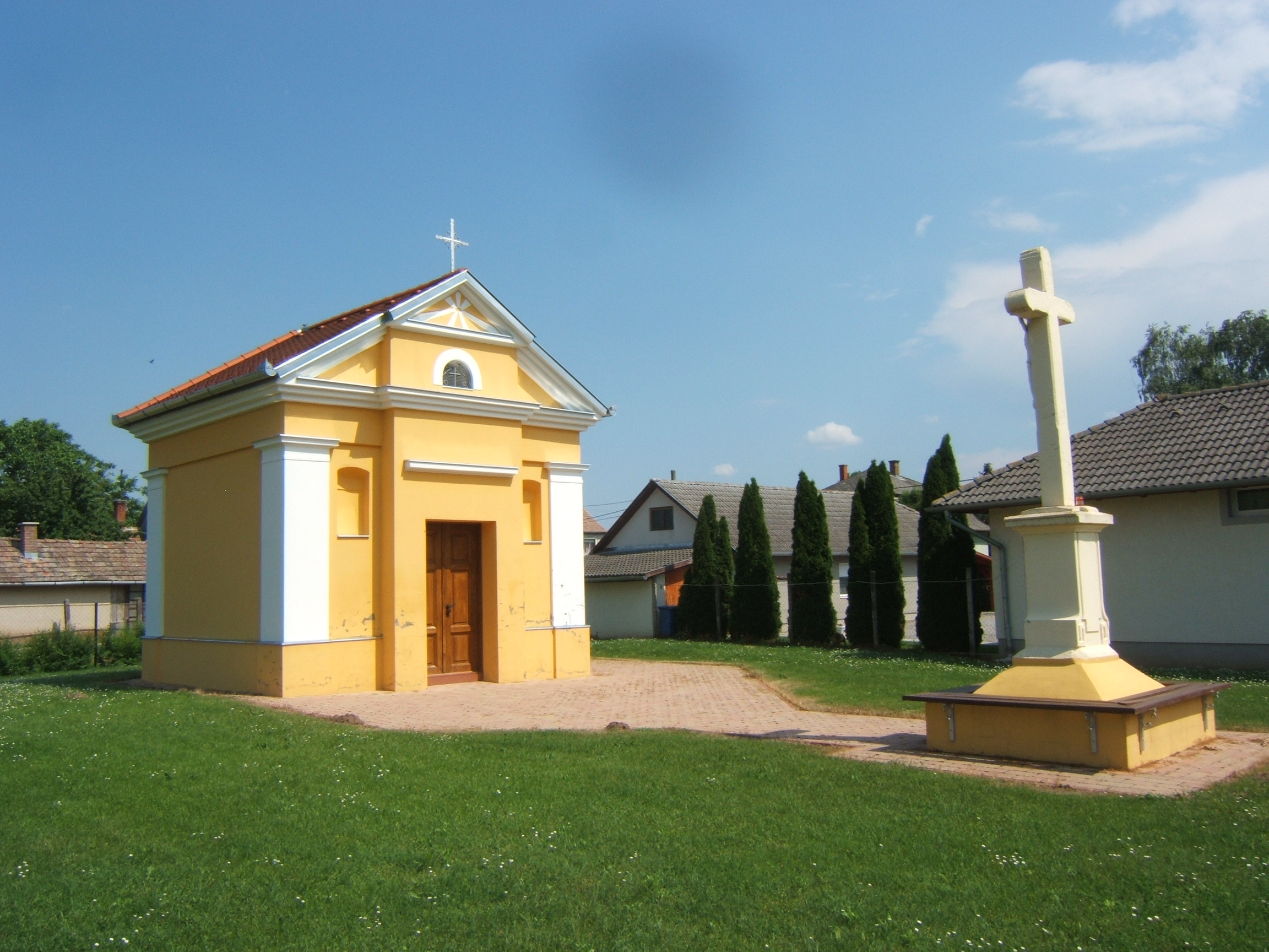 Somogysárd, Szent Rókus-kápolna